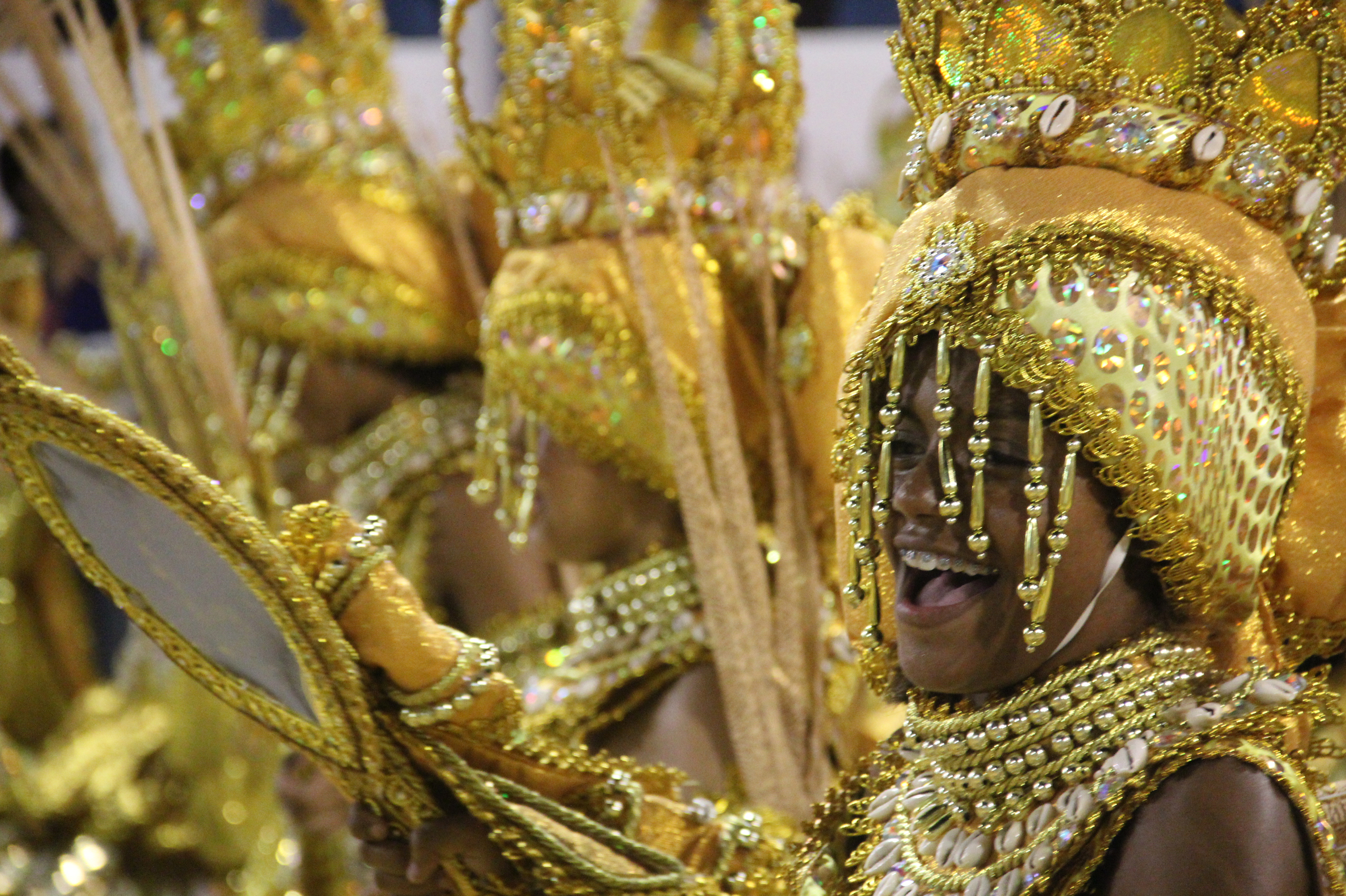 Rio de Janeiro - Homenageando o escritor Jorge Amado, a escola Imperatriz Leopoldinense levou para a avenida o brilho e as histórias das principais obras do autor baiano (Repórter Vladimir Platonow/ABr)